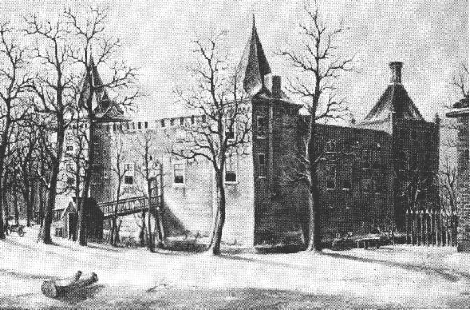 Foto van het voormalige slot Ilpenstein